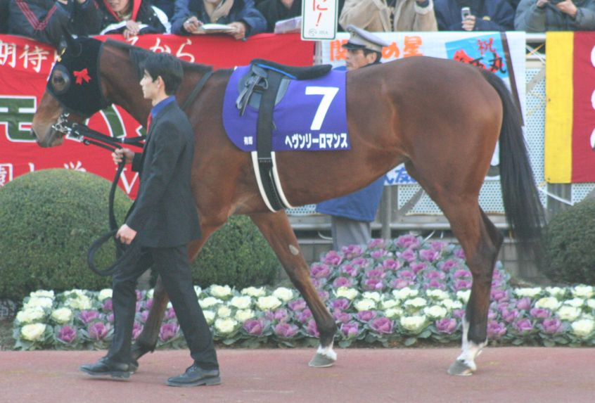 ヘヴンリーロマンス（中山競馬場）